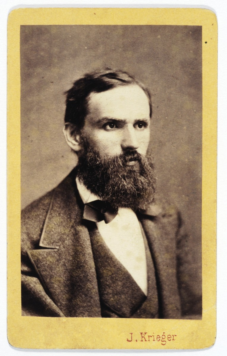 Karol Estreicher (1827-1908). Zdjęcie ze zbiorów Biblioteki Narodowej, F.6789